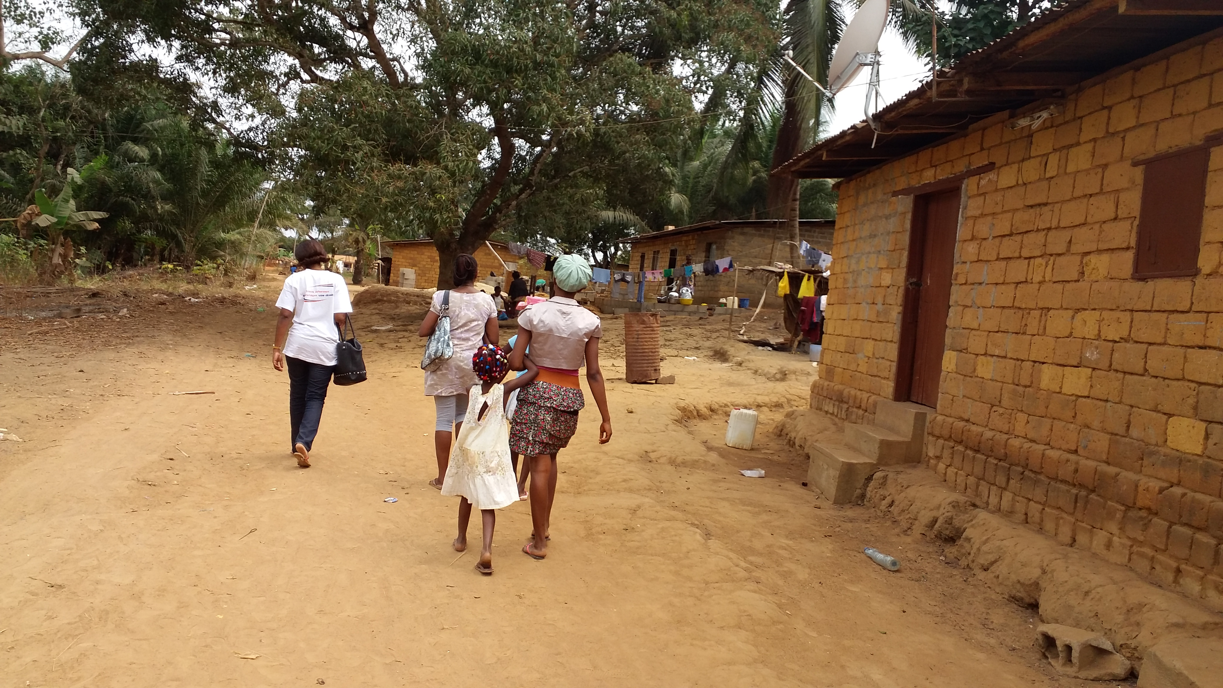 Maison en terre battue de mon village natal ! This is an image of Cultural Fashion or Adornment from Gabon